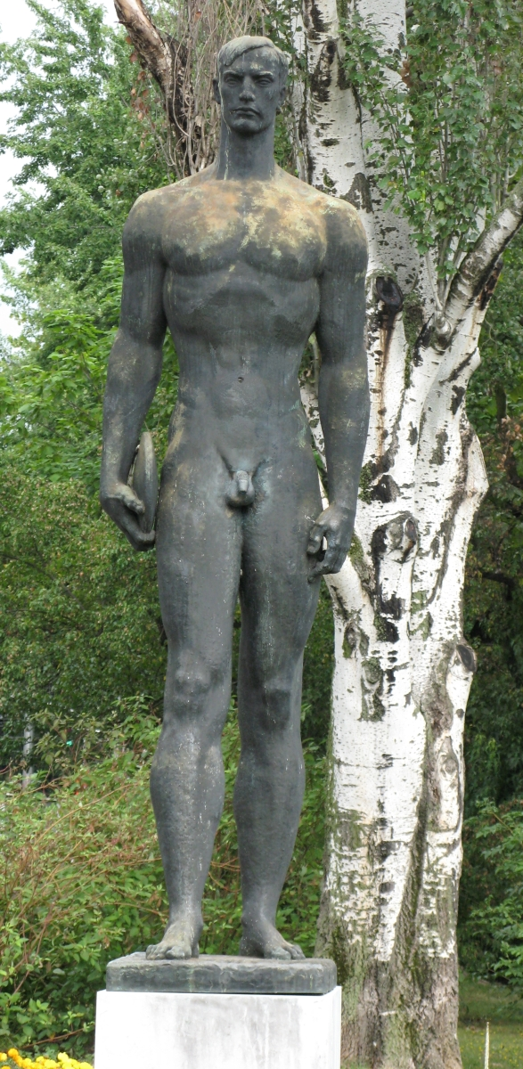 Bacač diska Vanje Radauša u Maksimiru